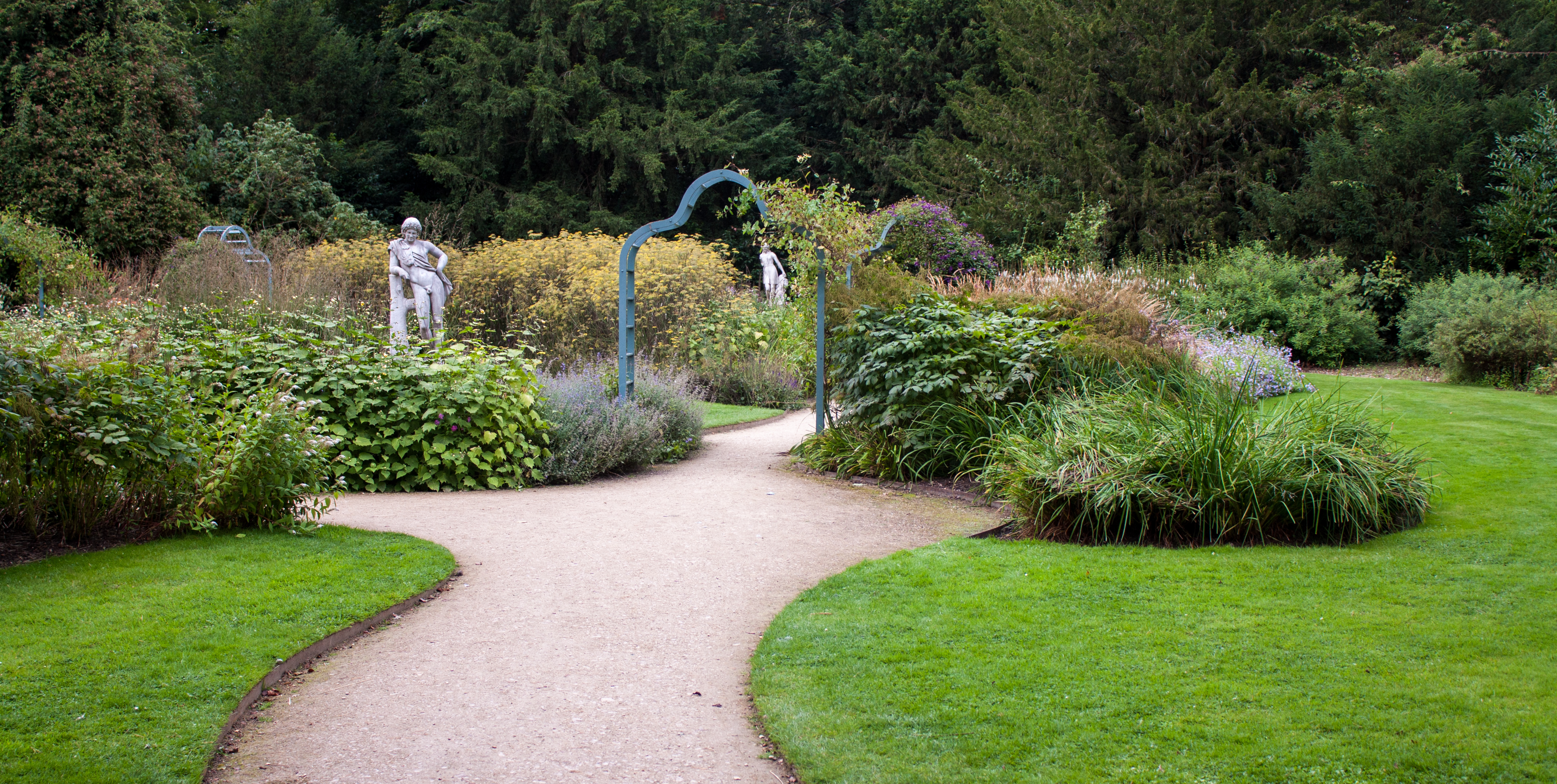 Secret Garden, Cliveden